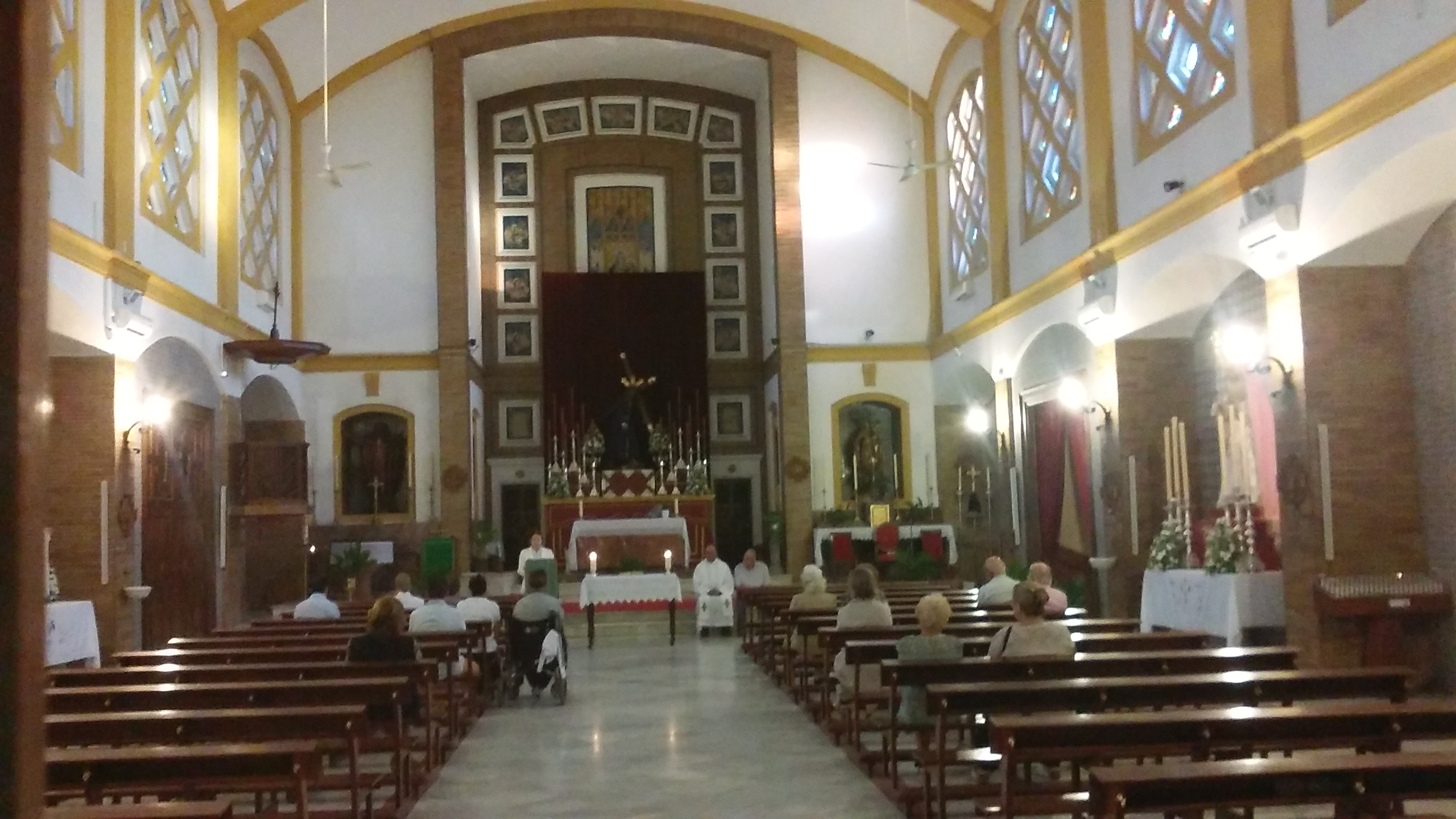 Interior de la Iglesia de Santa Ana (Jerez, Andalucía)